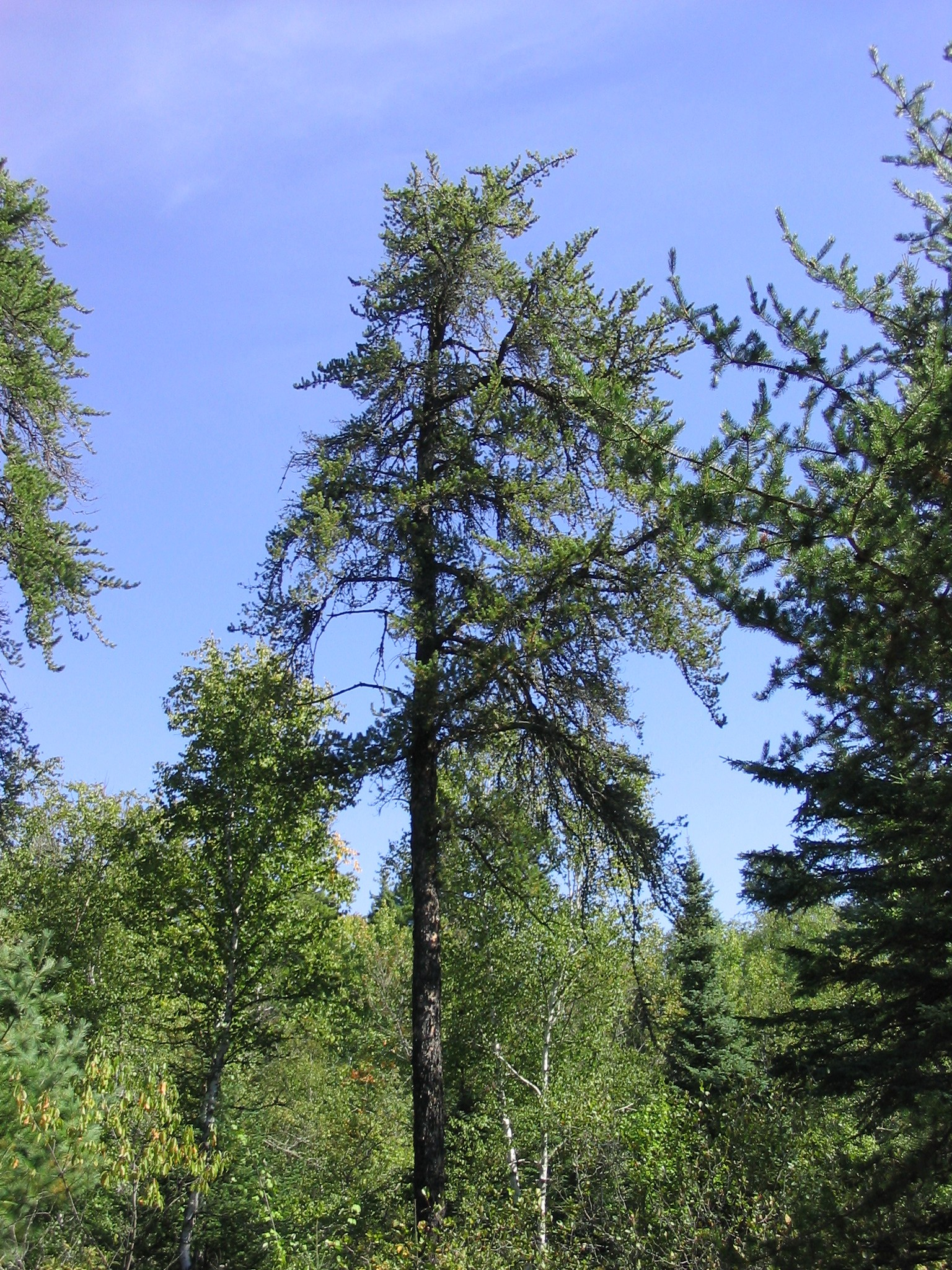 Pinus banksiana 2-eheep